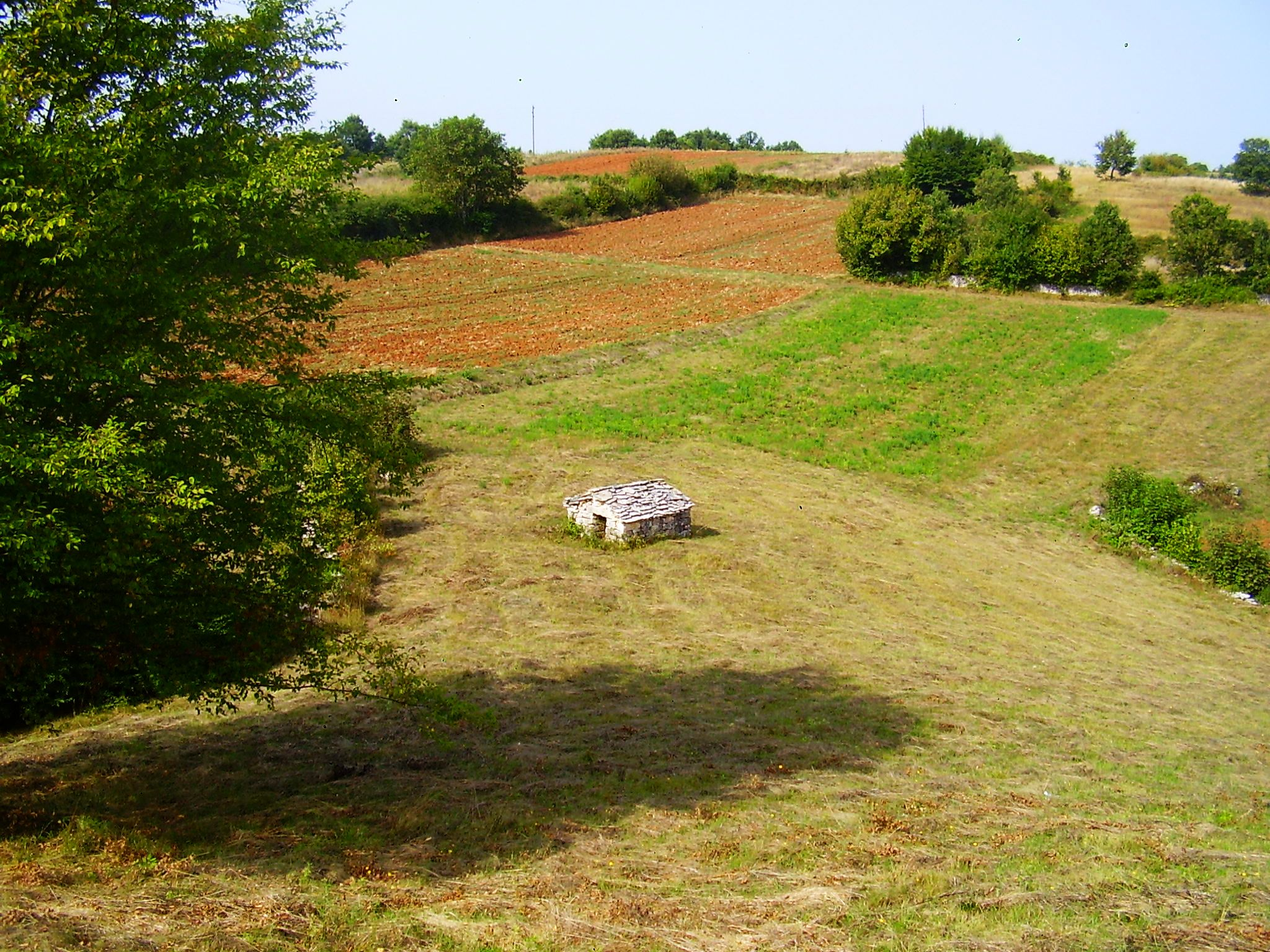 Istarski kažun, Žbandaj